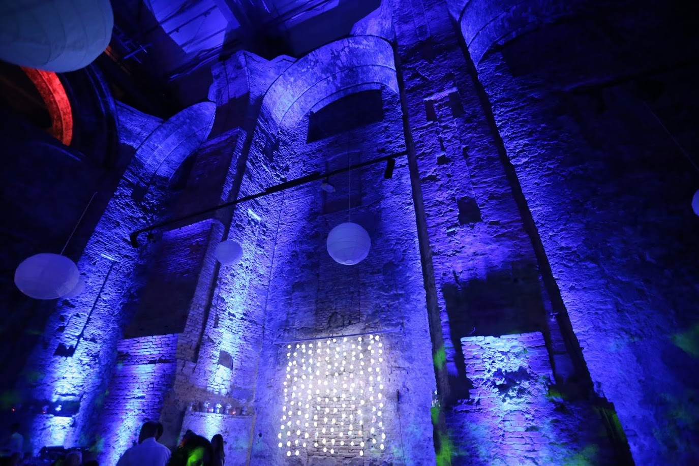 Az egykori templomépület belső tere színes kivilágításban